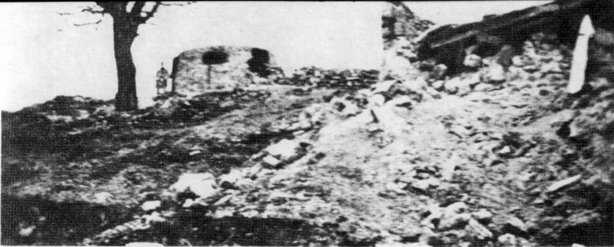 Srpskohrvatski / српскохрватски: Razrušena stara austrijska kasarna u Jablanici u kojoj se bio zabarikadirao jedan bataljon italijanske divizije Murđe. Tek kada je partizanski teški bacač pogodio slagalište s municijom, Italijani su se predali.